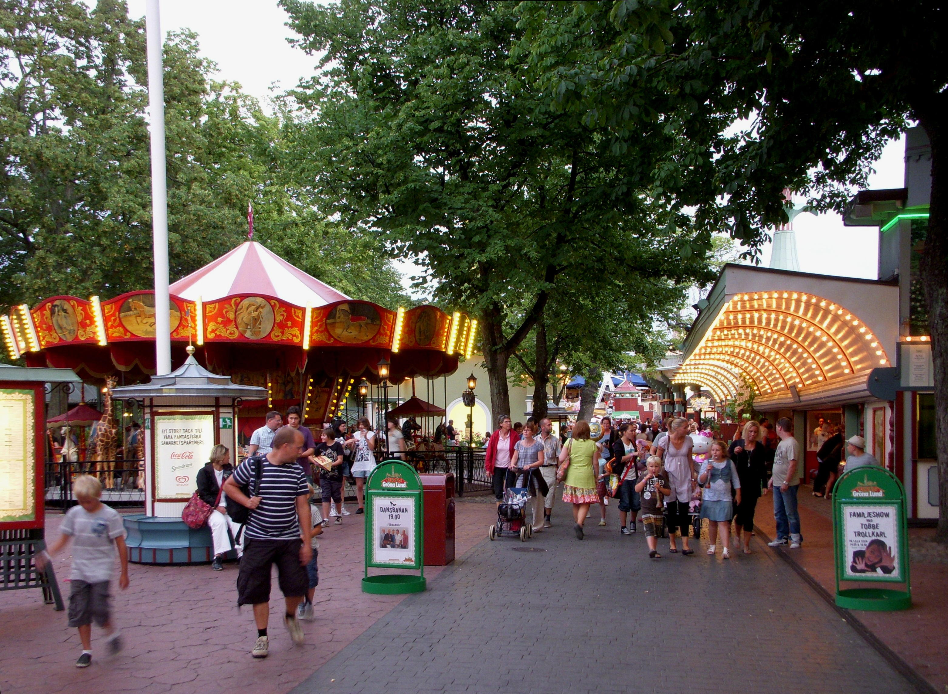 Gröna Lund i Stockholm